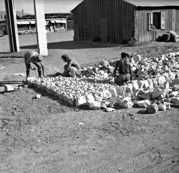 בית-זרע 1939 - בניית כביש הסולינג ליד מגדל המים - וינטרשטיין